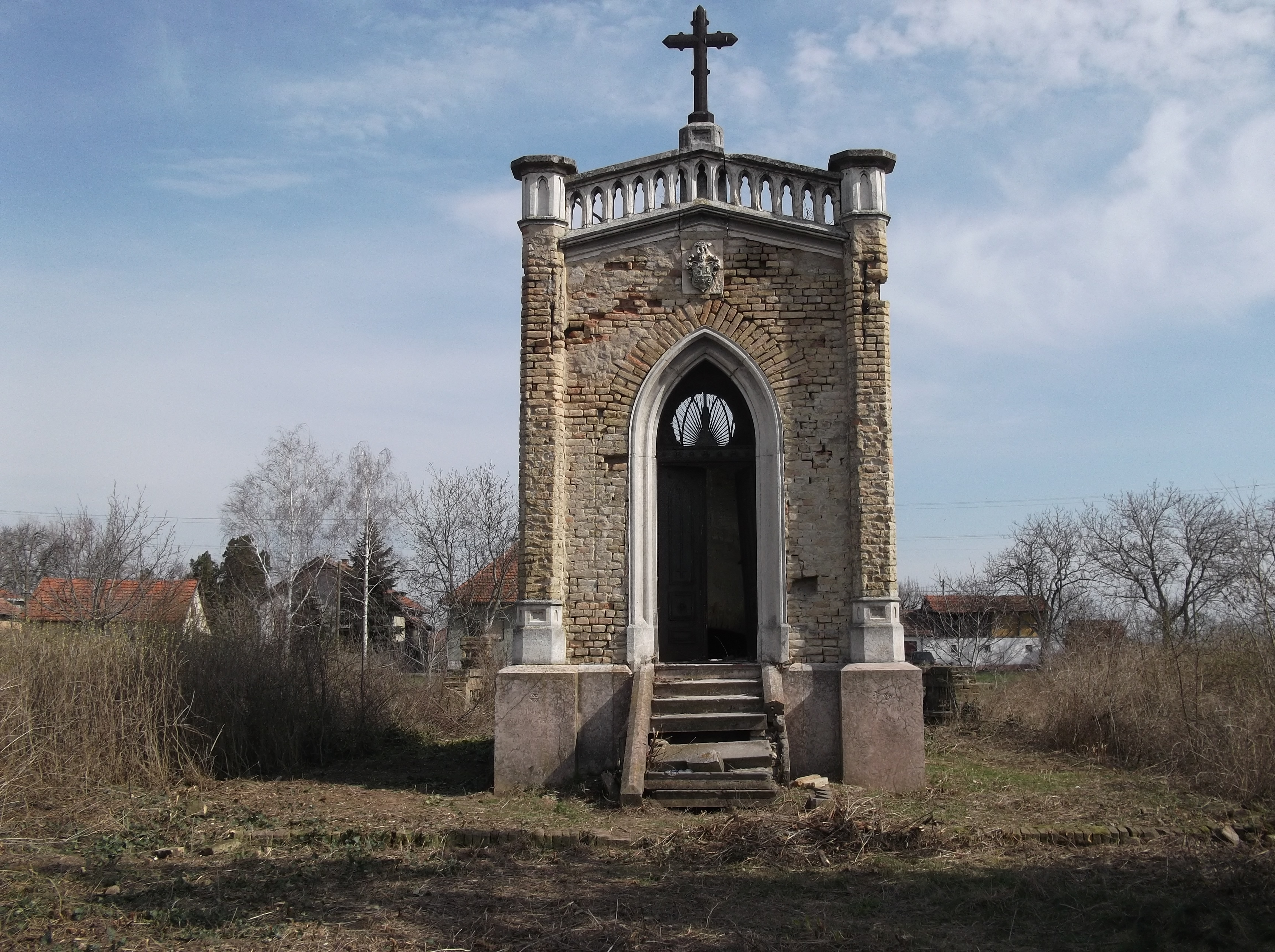 Капела Сервијски у Новом Кнежевцу